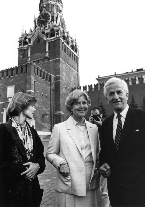 Moskau, 6. Juli 1987 Vom 6. bis 11. Juli 1987 statteten Bundespräsident Dr. Richard von Weizsäcker und seine Frau Marianne der Sowjeunion einen Staatsbesuch ab. Sie wurden von dem Bundesminister des Auswärtigen, Hans-Dietrich Genscher, begleitet. Neben seinen Begegnungen mit Staatsoberhaupt Gromyko und Generalsekretär Gorbatschow traf Bundespräsident von Weizsäcker in Moskau mit sowjetischen Künstlern, Vertretern der Presse und des Geisteslebens zusammen. Der offizielle Teil des Besuchs ging mit einem Aufenthalt in Leningrad zu Ende. Am 10. Juli flogen der Bundespräsident und seine Delegation zu einem zweitägigen privaten Besuch nach Nowosibirsk weiter. Im Bild: Auf dem Roten Platz v.l.n.r.: Marianne Beatrice von Weizsäcker, die Tochter des Bundespräsidenten, Frau Marianne von Weizsäcker und Bundespräsident Dr. Richard von Weizsäcker